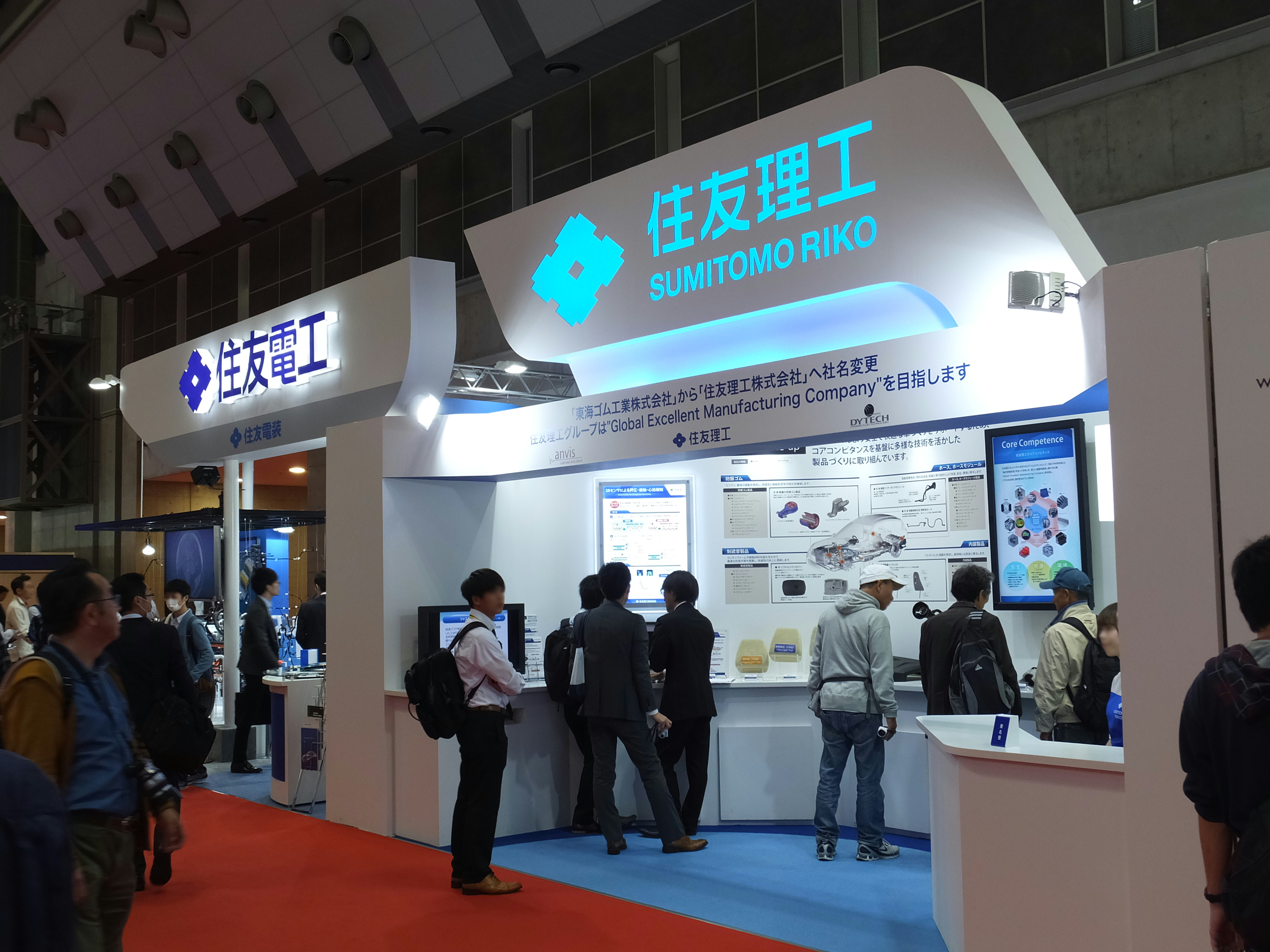 東京モーターショー2015に出展している住友理工(株)(旧・東海ゴム工業(株)）のブース。